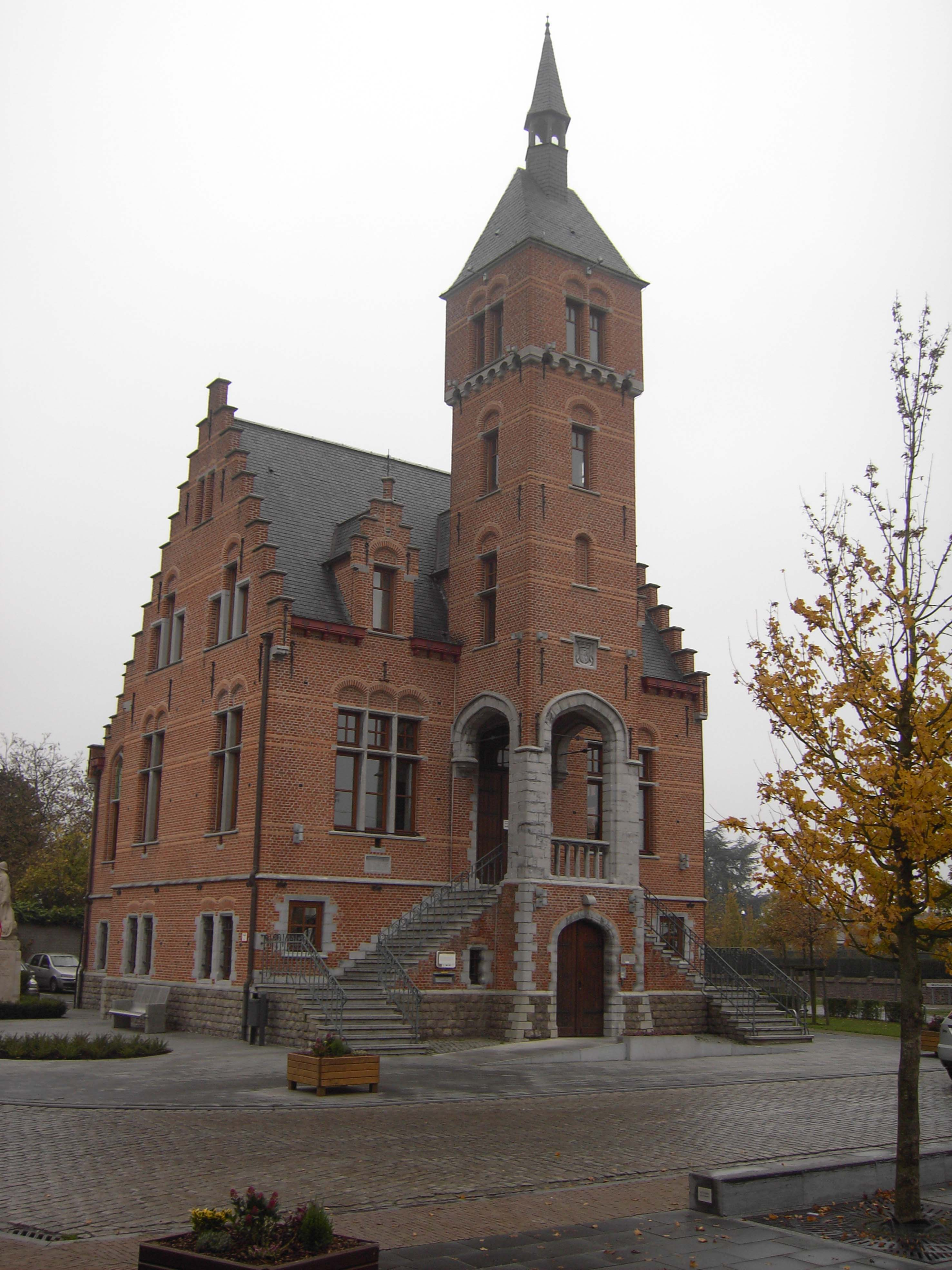 Lovendegem - gemeentehuis - Oost-Vlaanderen - België